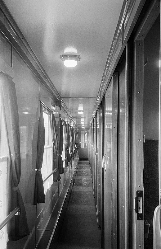 Original image description from the Deutsche Fotothek Innenansicht des Gangs in einem Schlafwagen